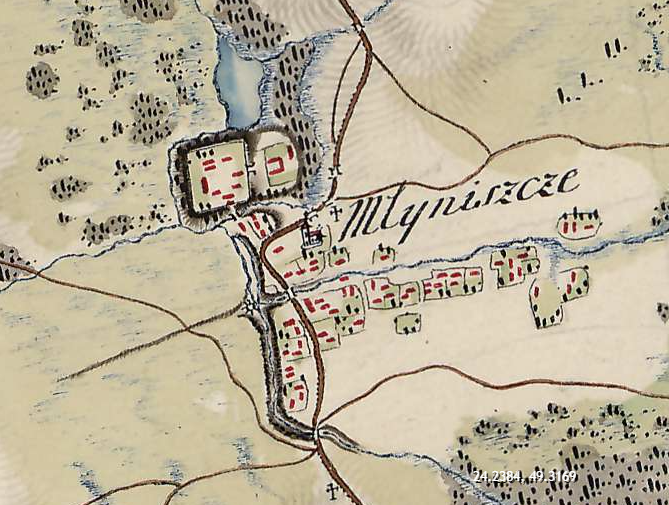 Млиниська на австрійській мапі фон Міга 18ст.